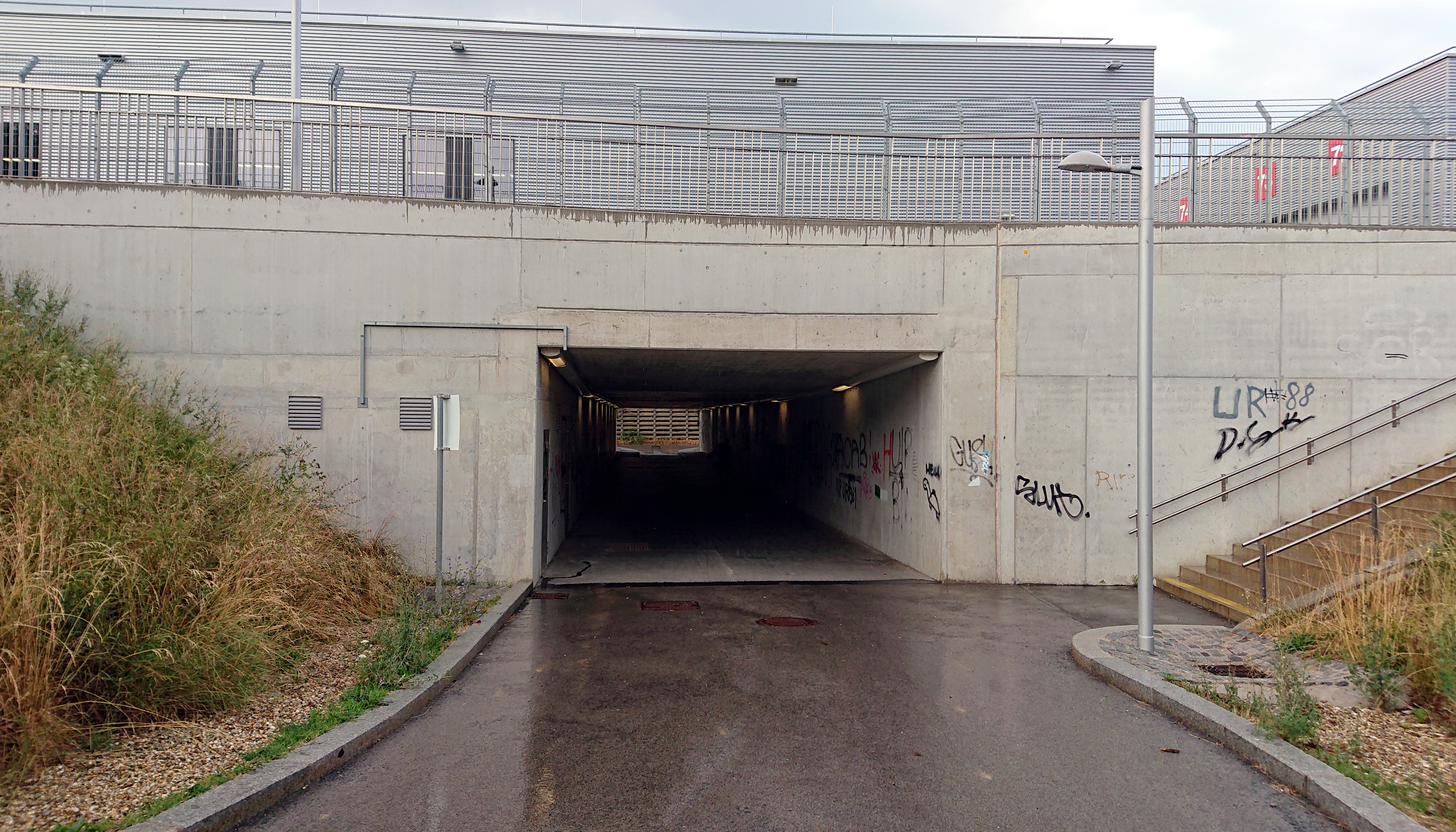 Unterfahrung Alma-Rosé-Gasse zwischen Oberlaa und der Per-Albin-Hansson-Siedlung. Unterquert die Donauländebahn und seit dem Bau der U1 auch deren Strecke zur Endstation Oberlaa. Liste der Brücken in Wien/Favoriten